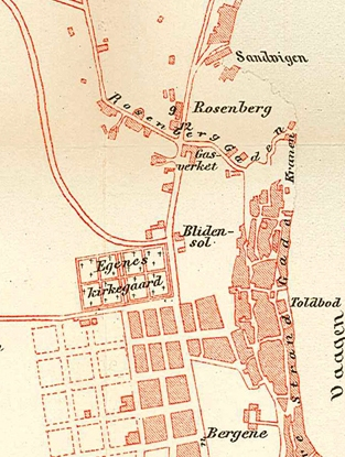 Kart over Stavanger, 1889